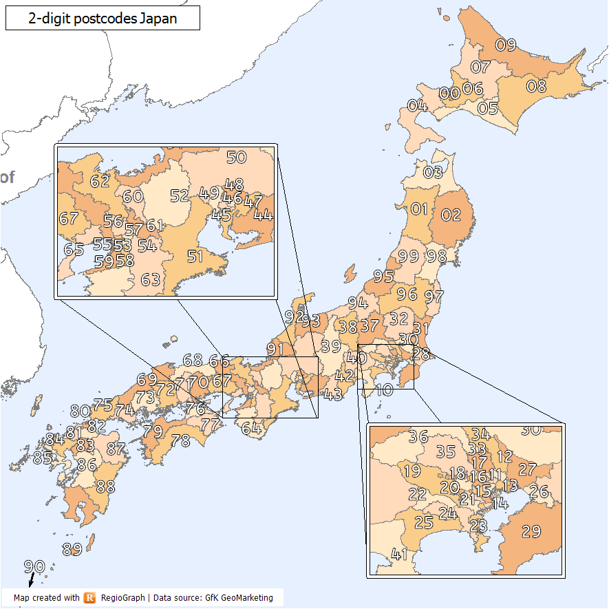 Zweistellige Postleitzahlgebiete von Japan